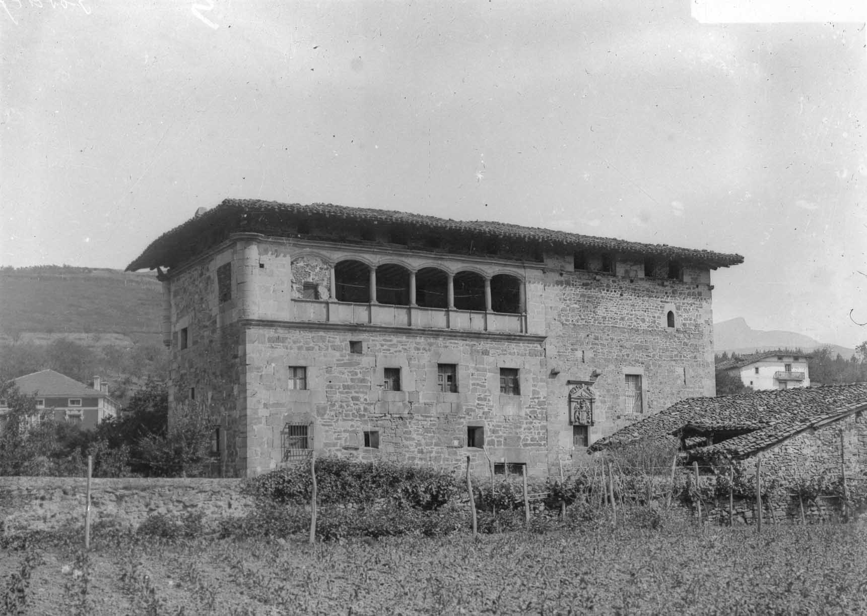 Oxirandoko dorrearen argazkia, Indalecio Ojanguren argazkilari eibartarrak egina.